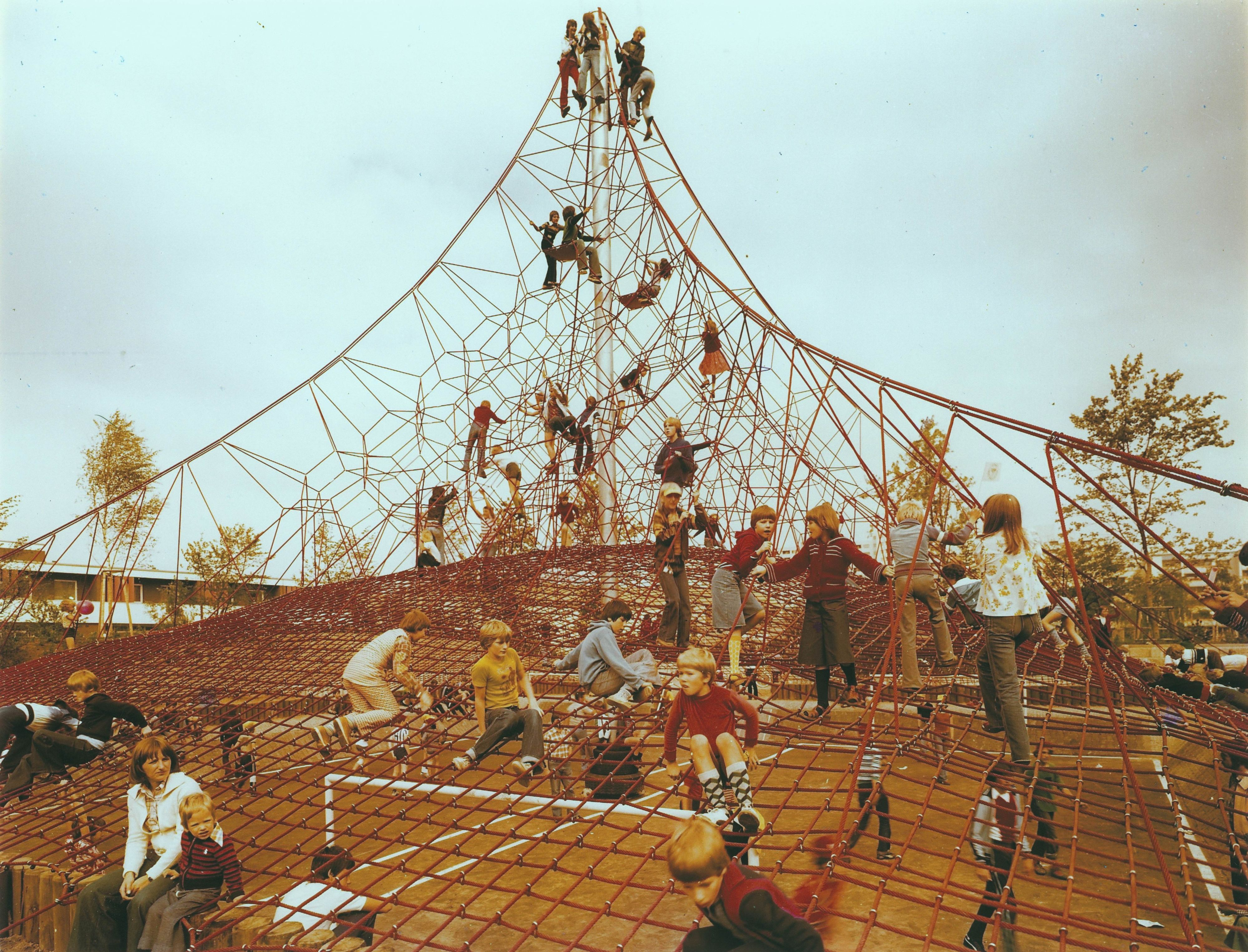 Super-Ballfangnetz in der GSW-Siedlung an der Obstallee in Berlin, 1978. Entwurf von Conrad Roland, Fotograf Antonius Flaskamp.